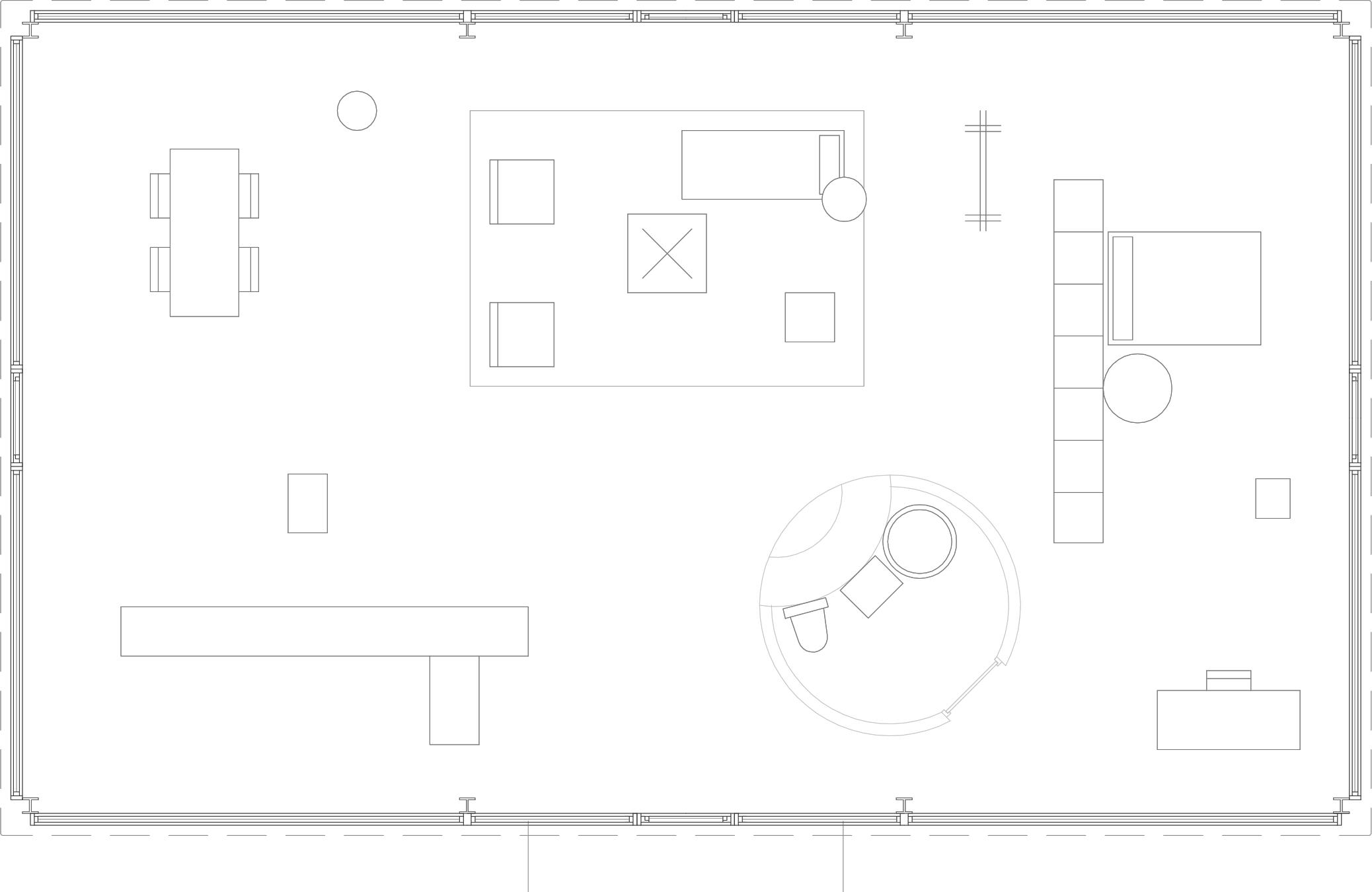 planta de la casa